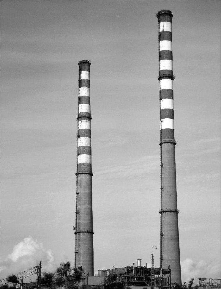 Central Termoeléctrica de Setúbal,Portugal.